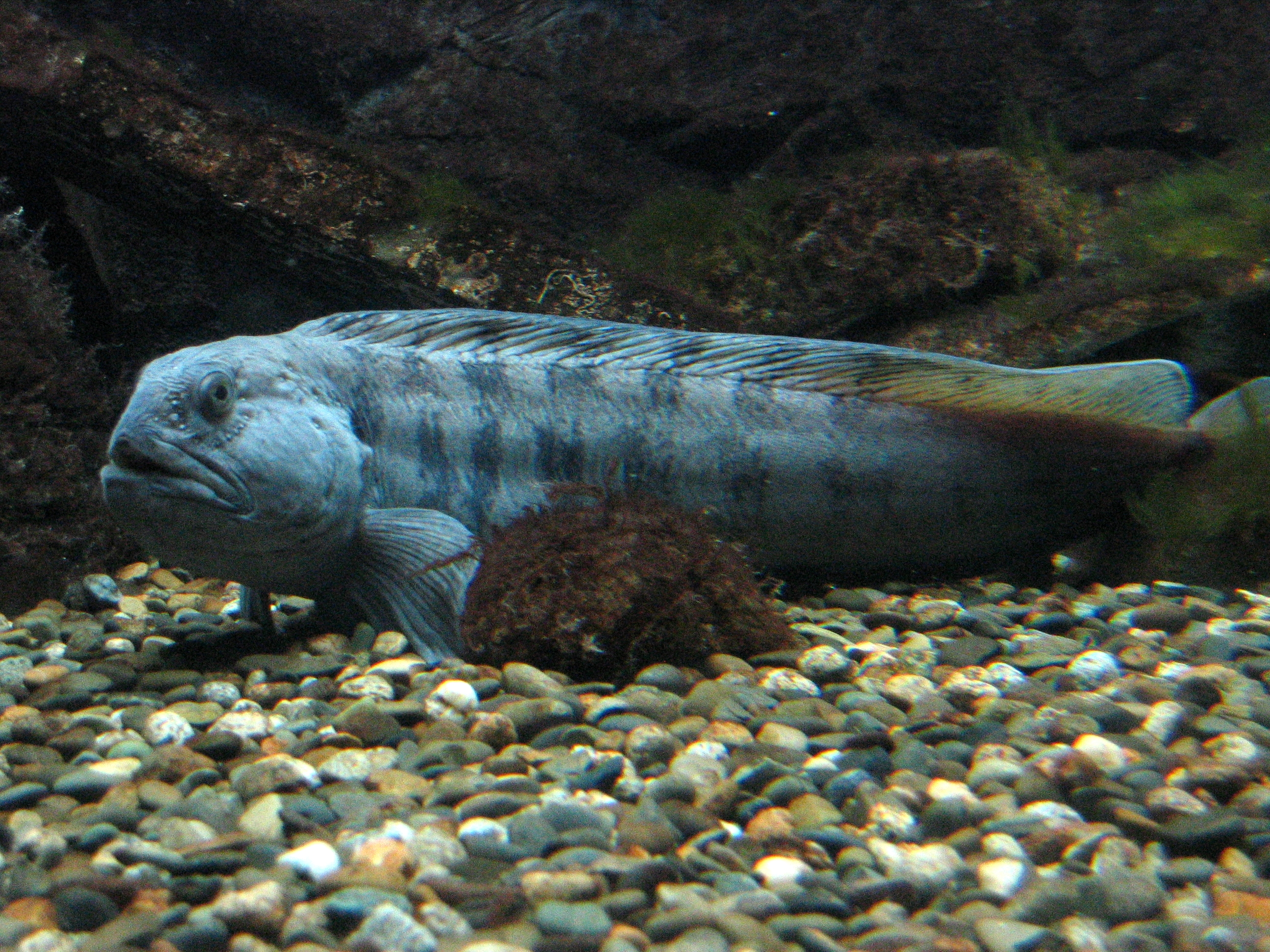 les aquariums d'Océanopolis, Brest : Anarhichas lupus – Loup de mer